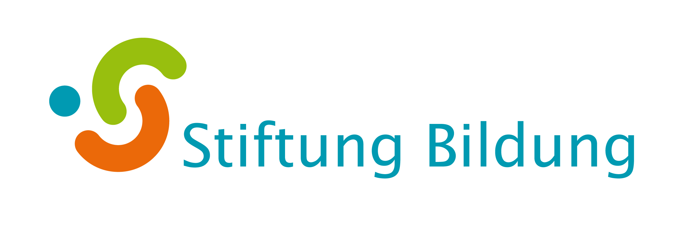 Logo der Stiftung Bildung